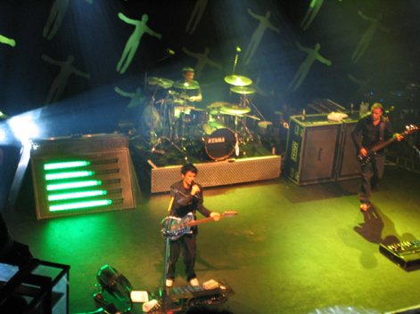 Muse